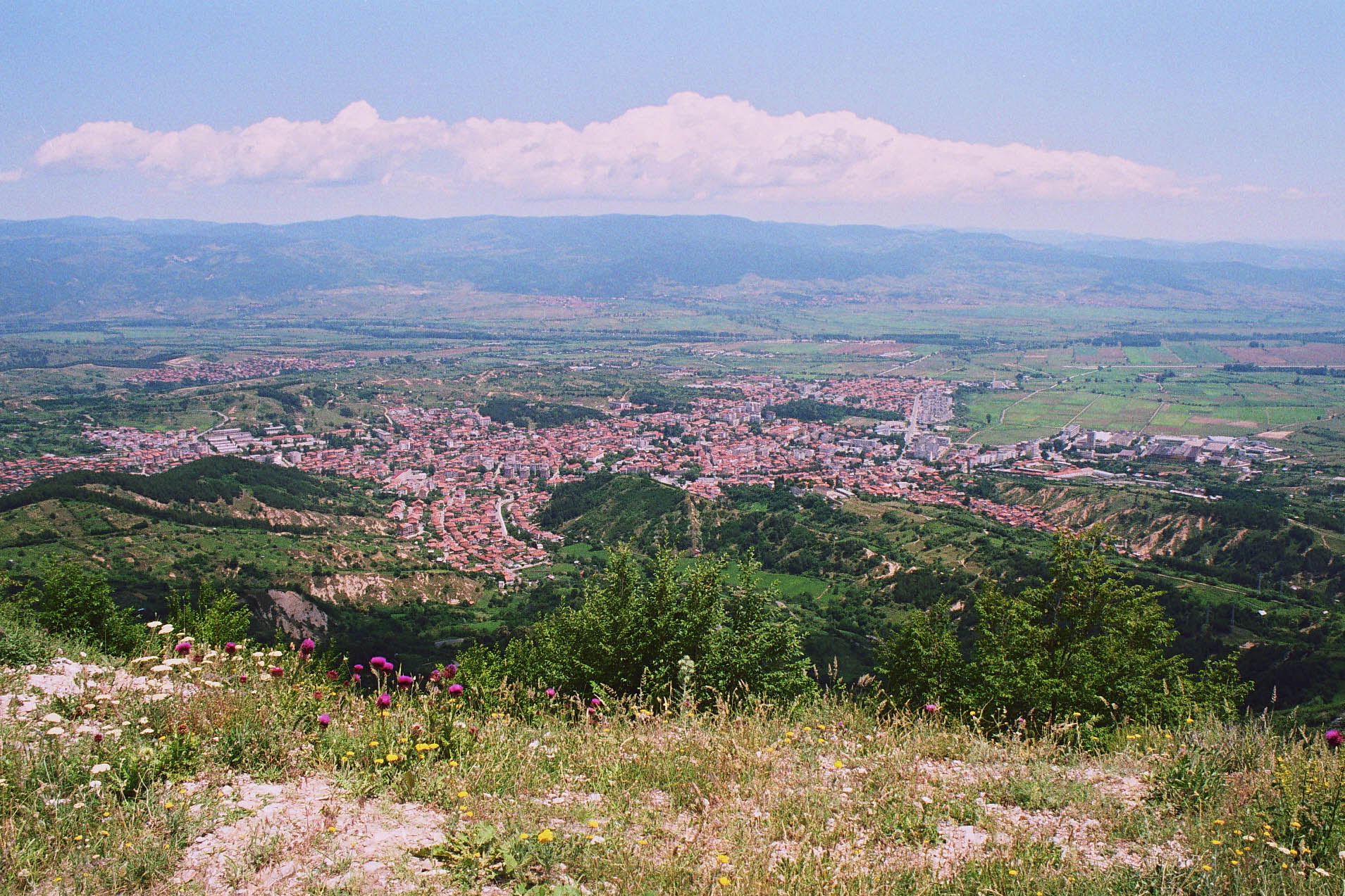 Гоце Делчев от високо